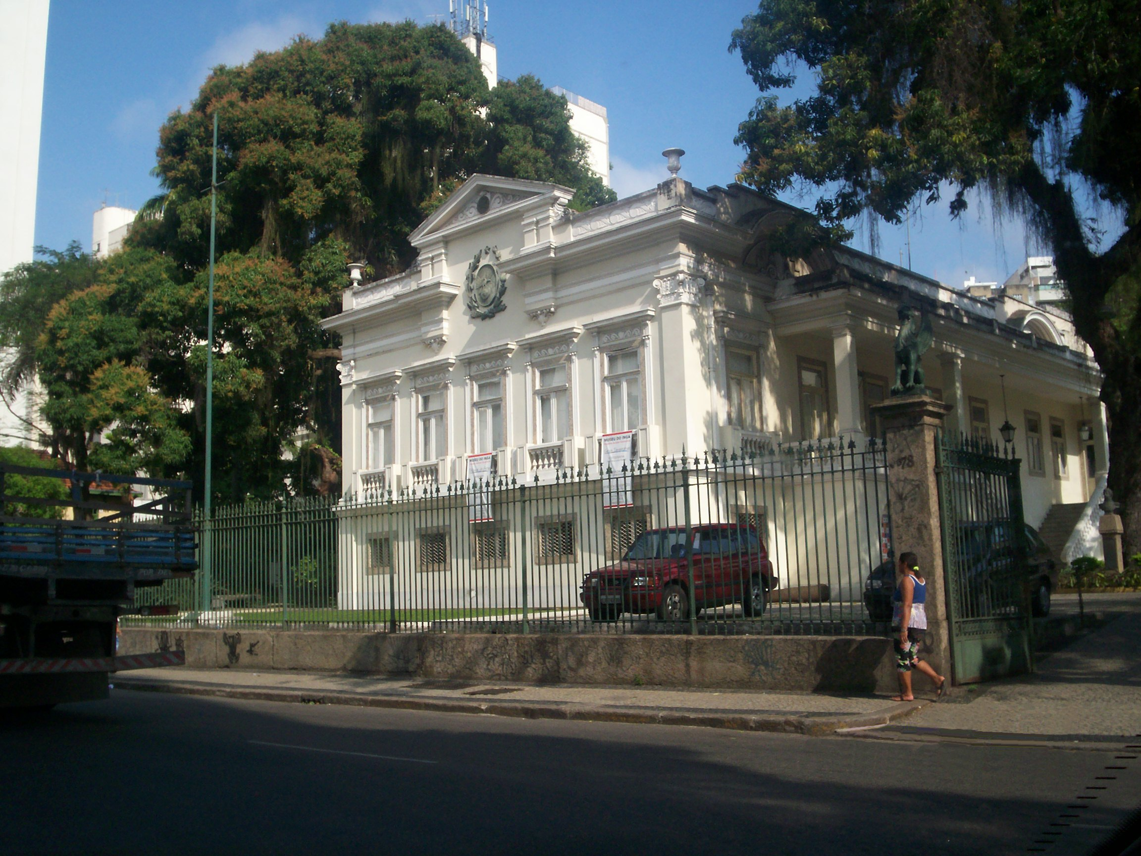 Palácio Nilo Peçanha, antigo palácio do Governador do Estado do Rio de Janeiro, atual sede do MHAERJ - Museu Histórico e Artístico do Estado do Rio de Janeiro